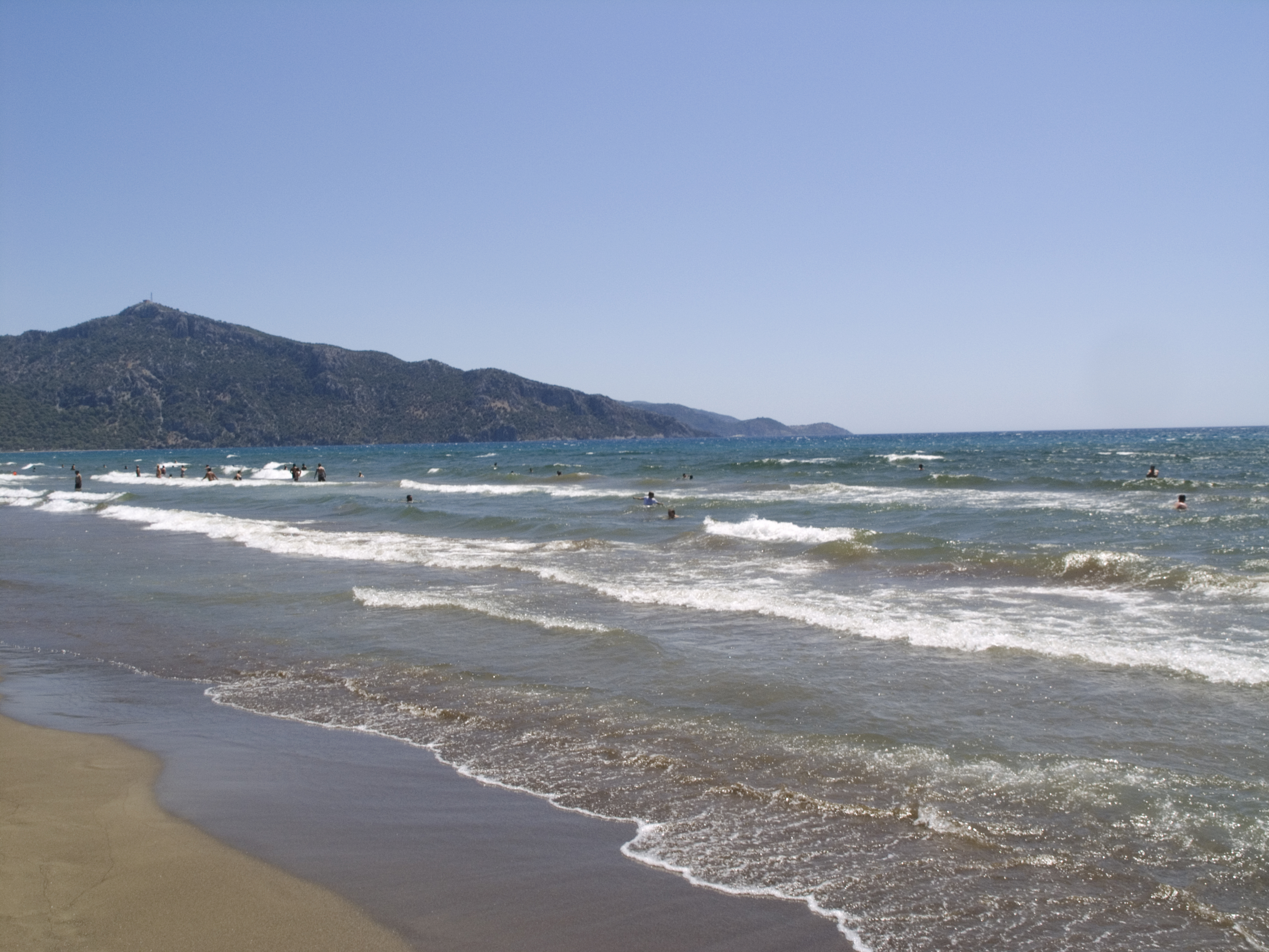 Турция, провинция Мугла - Черепаший берег Изтузу